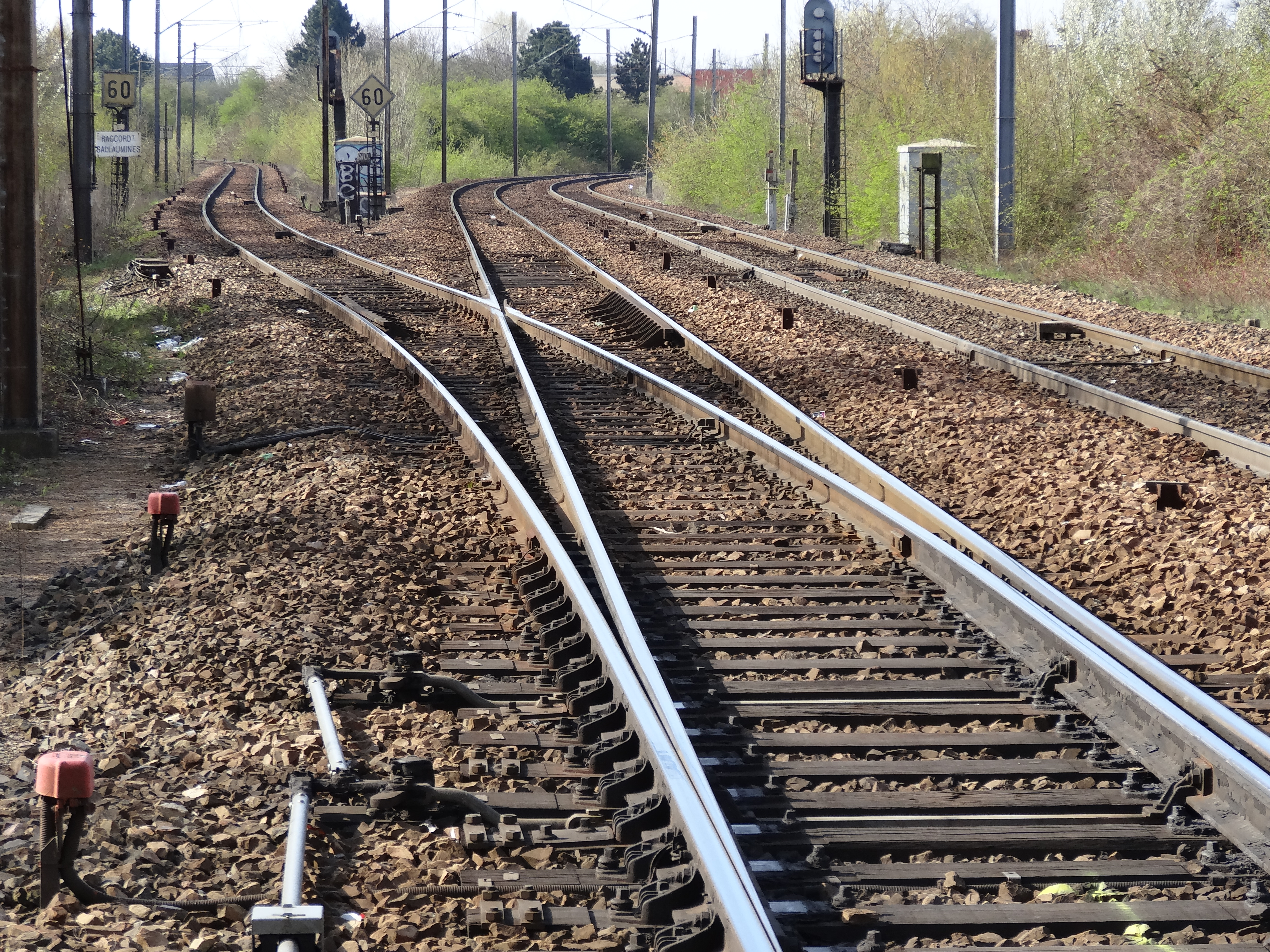 Gare de Sallaumines, Pas-de-Calais, Nord-Pas-de-Calais, France.